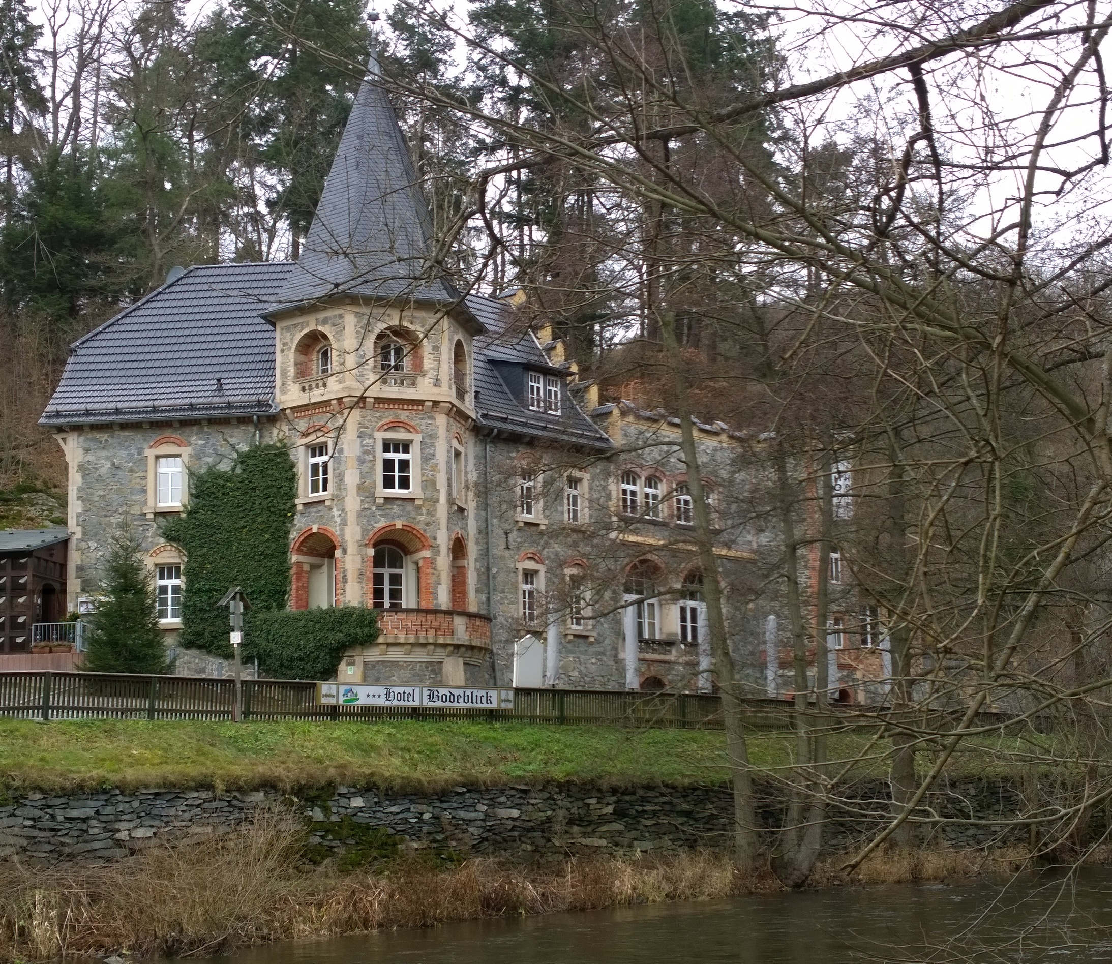 Hotel Bodeblick in Treseburg (Stadt Thale, Landkreis Harz; Sachsen-Anhalt)